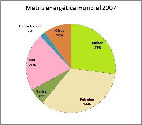 Matriz energetica mundial 2007